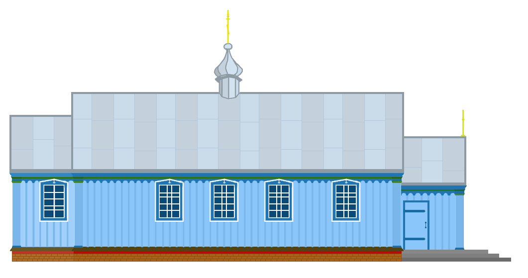 Пн сторона храму